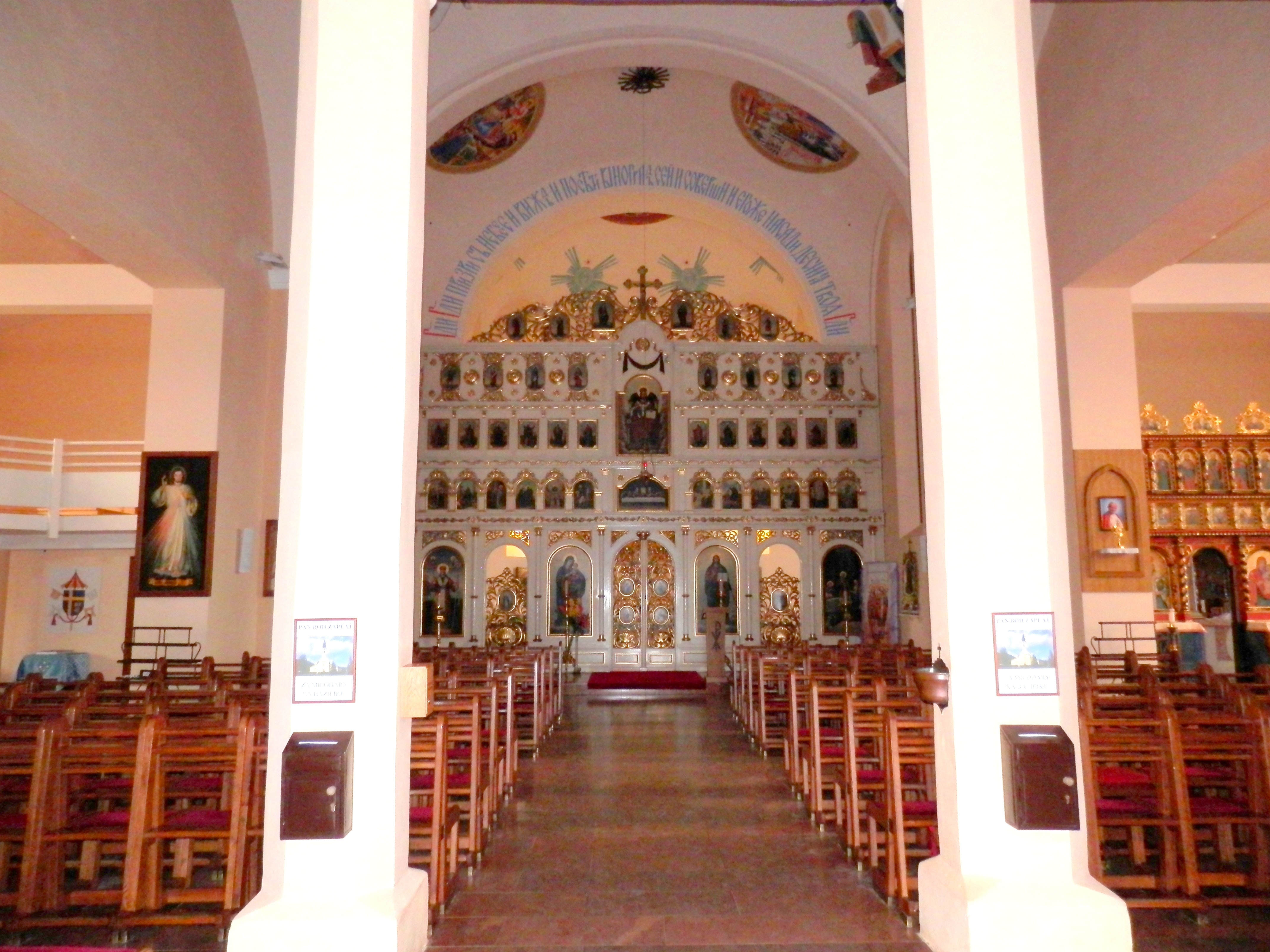 Interiér Baziliky v obci Ľutina okres Sabinov.